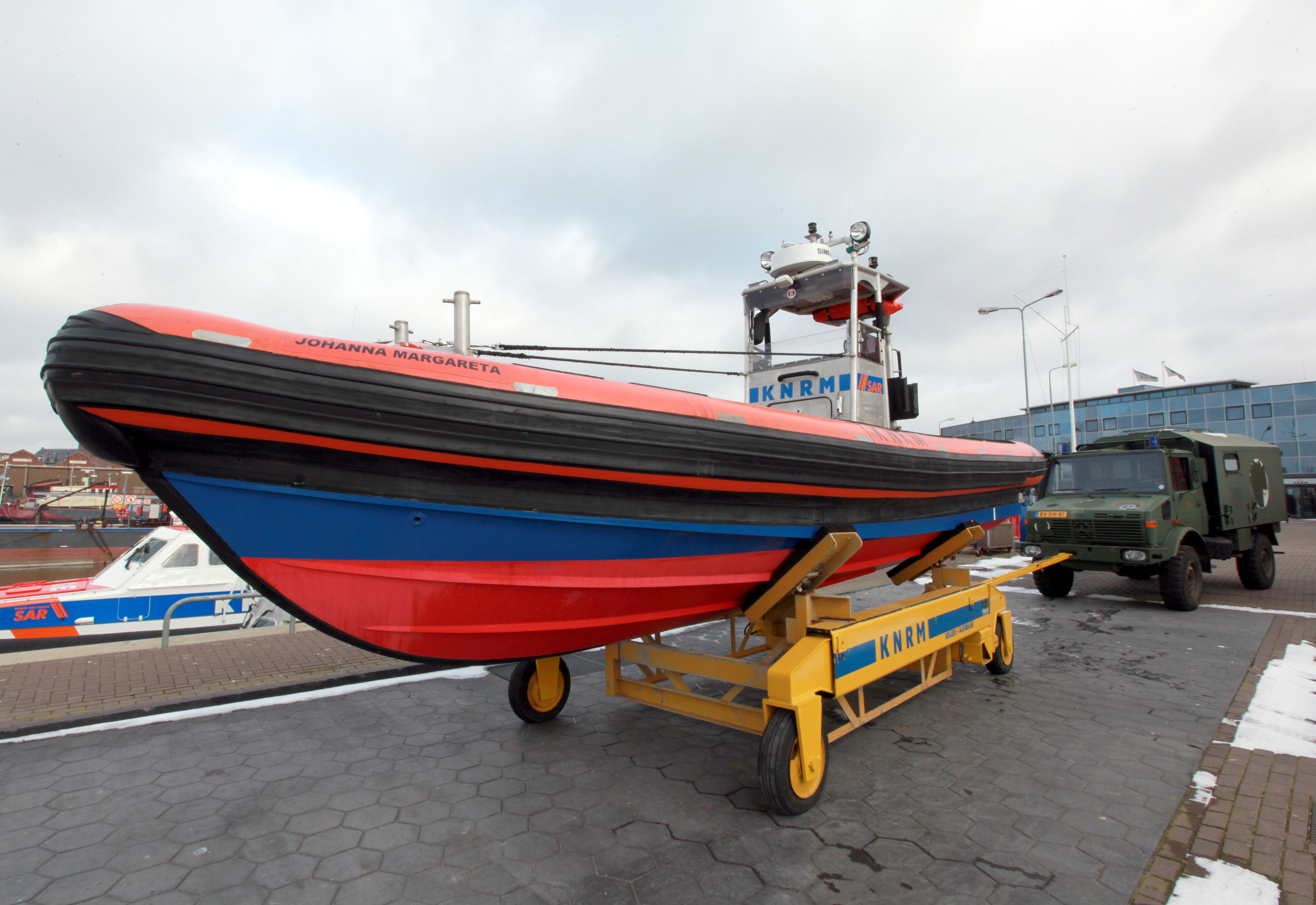 KNRM Johanna Margareta & Unimog 435